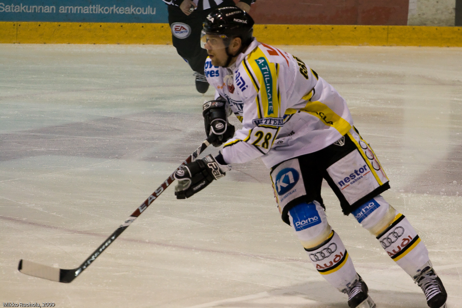 Ossi-Petteri Grönholm of Finnish Hockey Team Oulun Kärpät